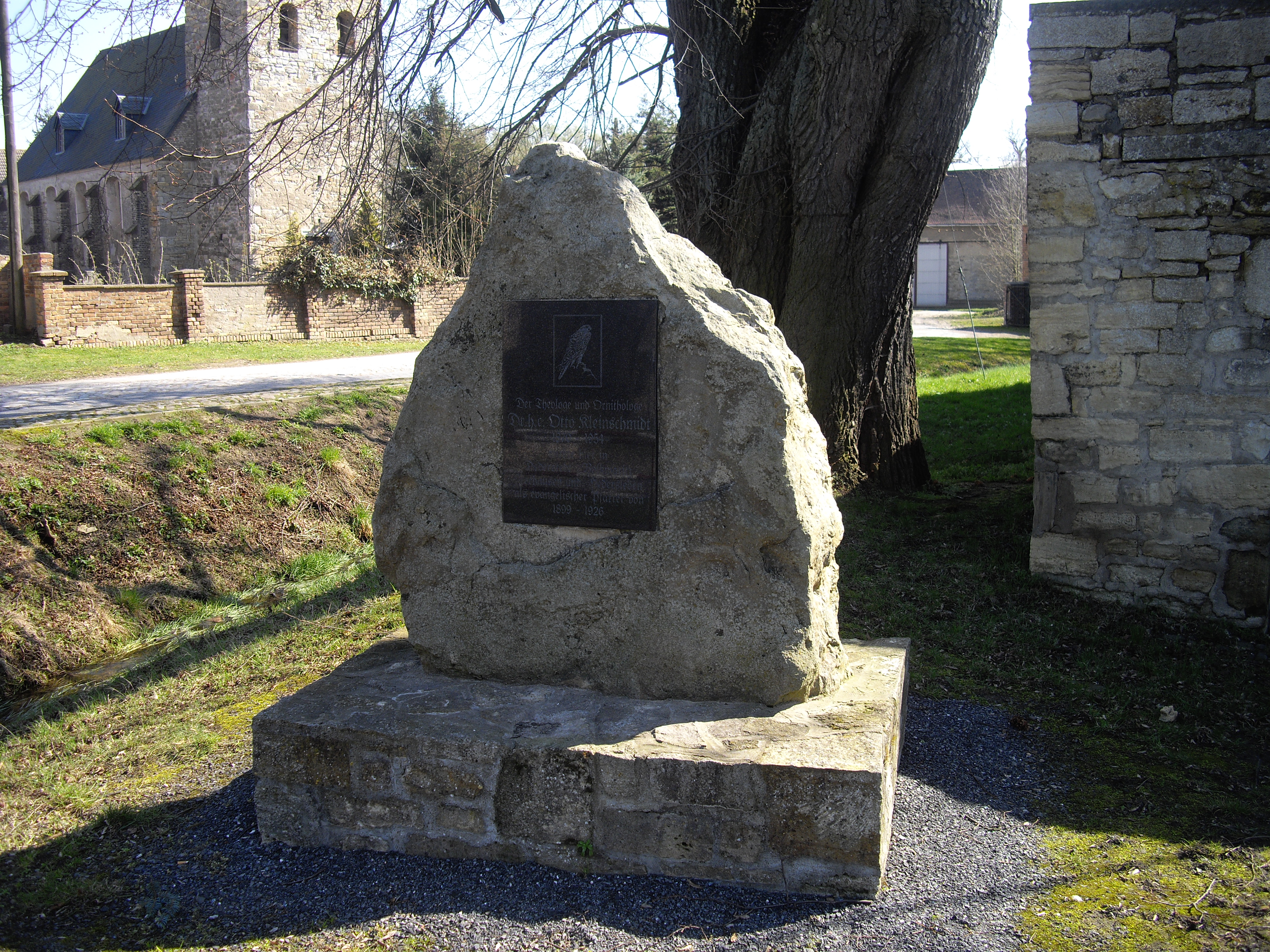 Das Denkmal auf dem Kirchplatz in Dederstedt, es ist dem Theologen und Ornithologen Dr. Otto Kleinschmidt gewidmet, der in Dederstedt, Neehausen, Elbitz und Volkmaritz von 1899 bis 1926 als Pfarrer gewirkt hat. .